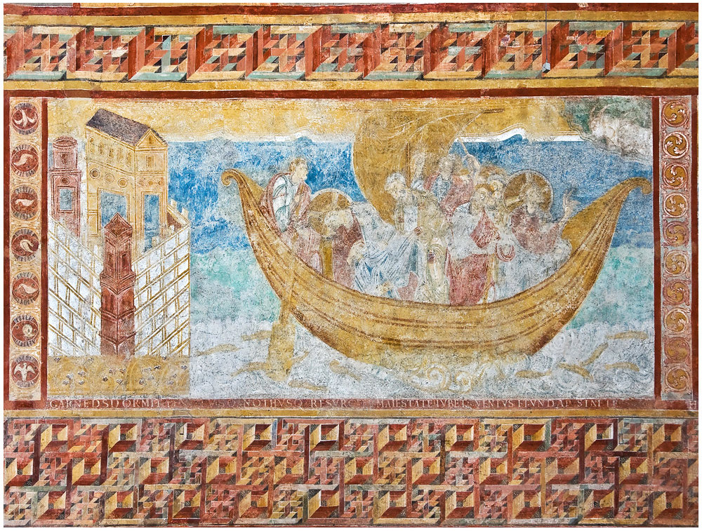 St. Georg, Oberzell, Fresken